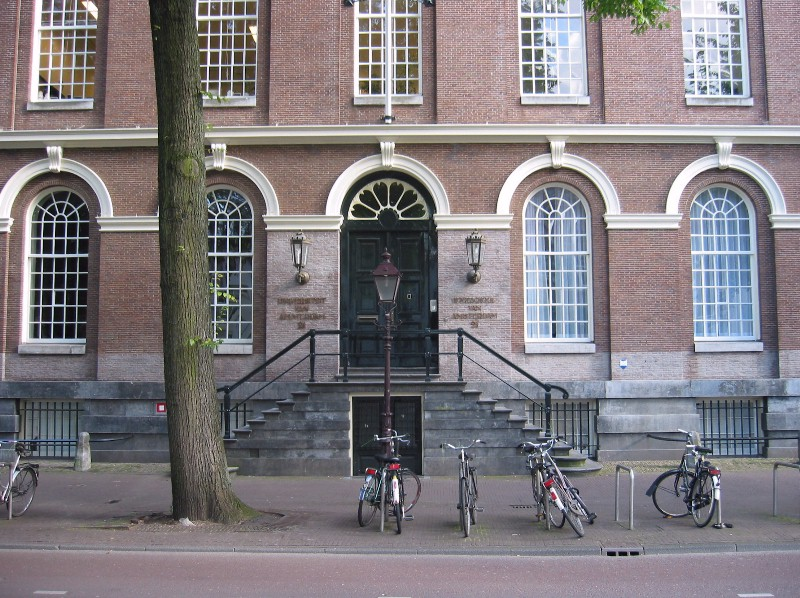 Foto Maagdenhuis (Universiteit van Amsterdam), Spui 24.